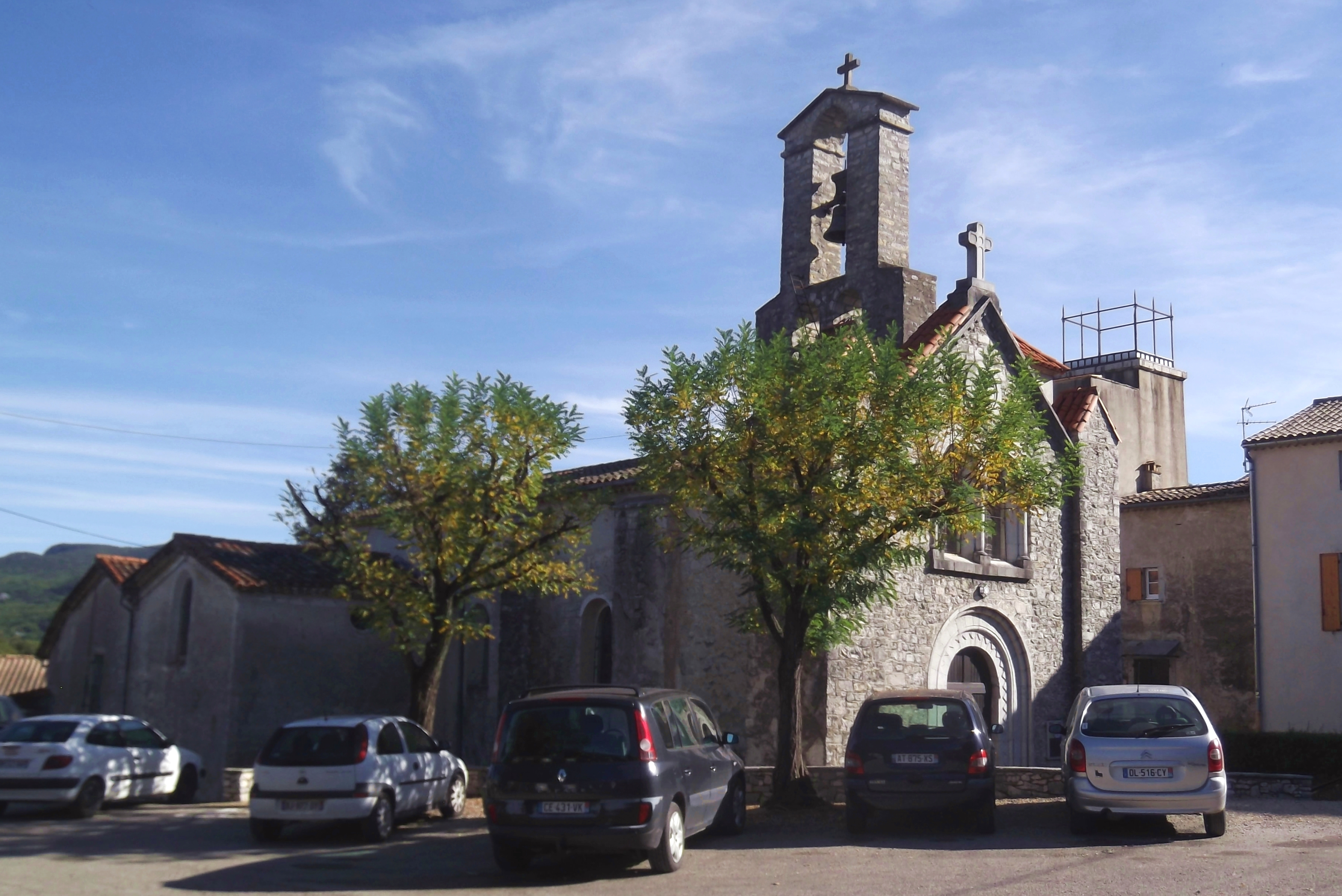 Cazilhac (Hérault), l’église Saint-Léonce.